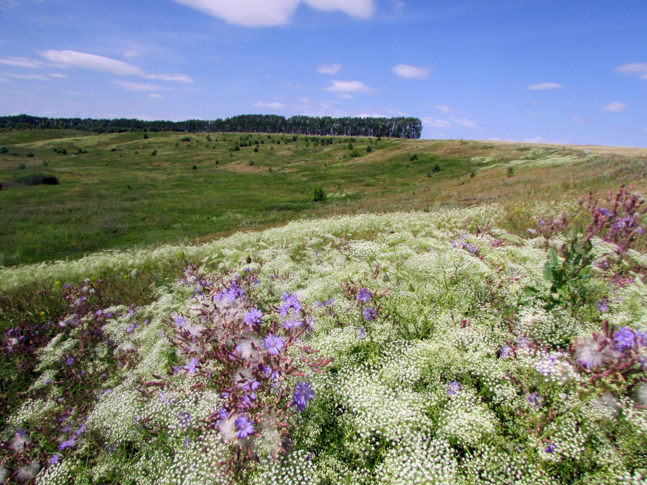 Батыревский сурковый, Батыревский район This image is related to the protected area of Russia number 2110024